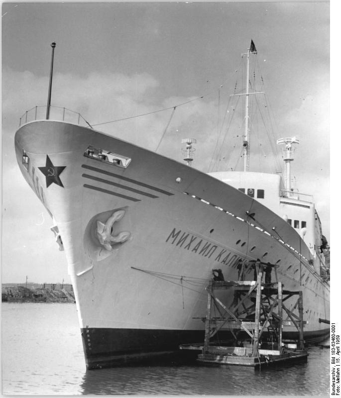 Zentralbild-Mellahn We-Noa 15.4.1959 Erstes Fahrgastschiff aus arktischen Gewässern zurück. Das auf der Wismarer Mathias-Thesen-Werft gebaute Seefahrgastschiff "Michail Kalinin" hat als erstes Fahrgastschiff in der Geschichte der Seefahrt die Anarktis erreicht. An Bord befanden sich sowjetische Wissenschaftler, die die Besatzungen antarktischer Forschungsstationen ablösten, sowie eine Gruppe polnischer Gelehrter. Die Werktätigen dieser weltgrößten Hochseewerft der DDR werden bis 1965 insgesamt 22 Seefahrgastschiffe für die Sowjetunion bauen. UBz: Nach großer Fahrt liegt die "Michail Kalinin" jetzt zur vertraglich vereinbarten Durchsicht im Wismarer Werfthafen."